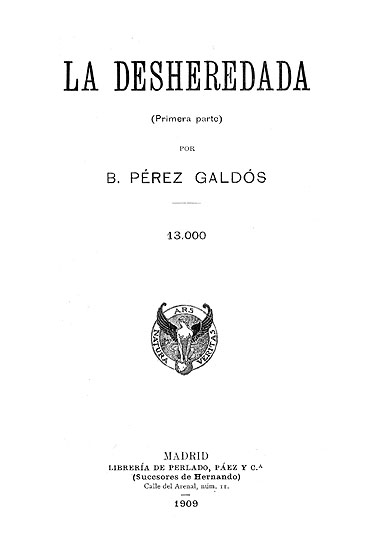 Portada de La deheredada, novela de 1881 de Benito Pérez Galdós.